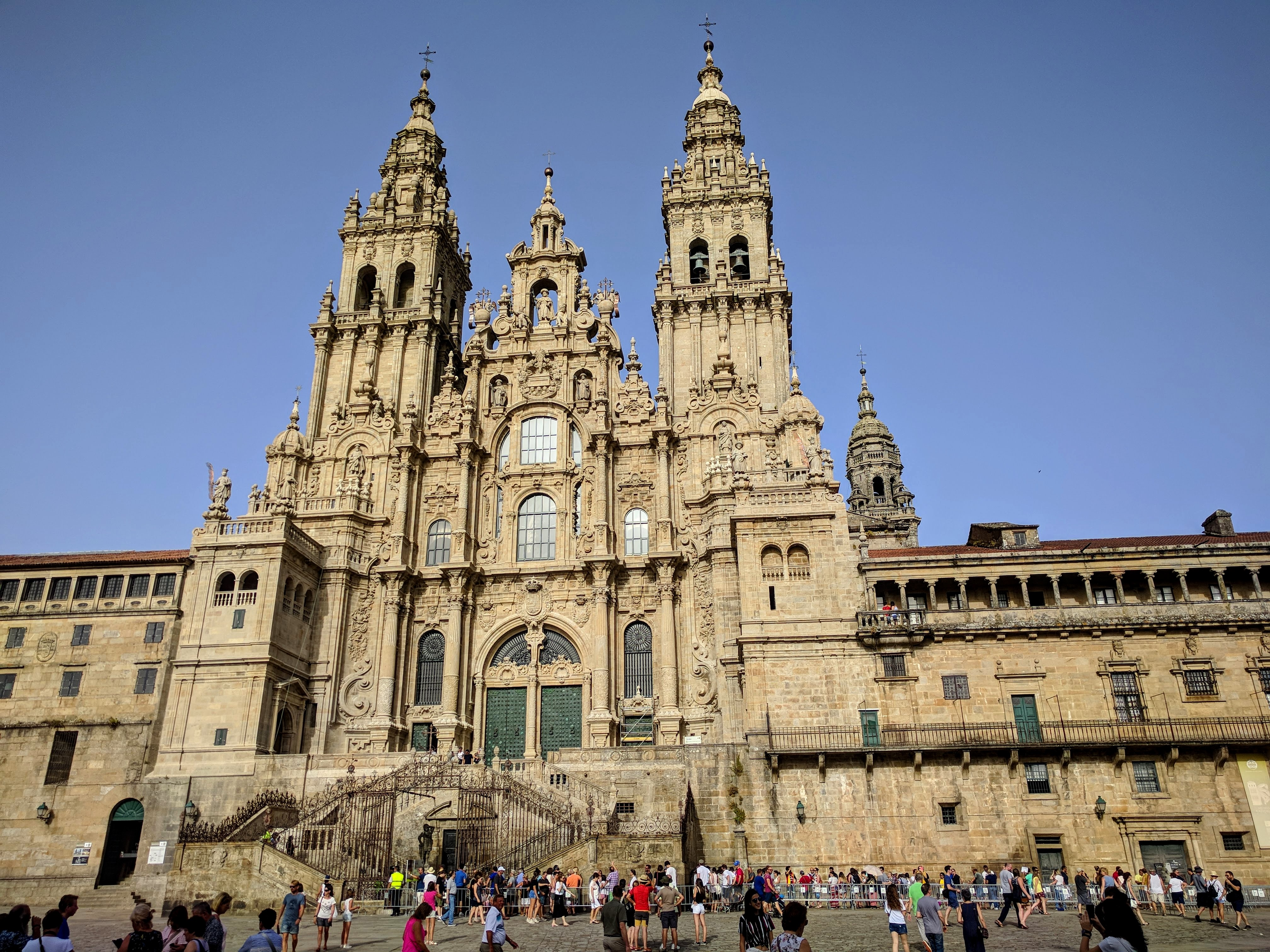 Imagen en agosto de 2018 de la fachada principal de la catedral de Santiago de Compostela.